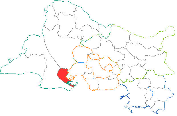 Situation du canton dans le département des Bouches du Rhône (France)